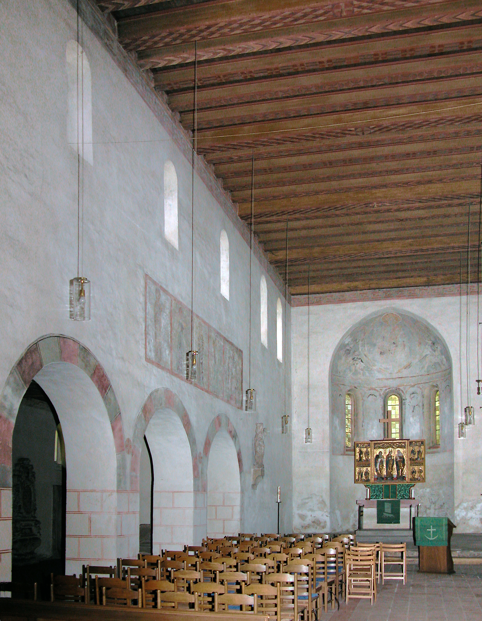 18.08.2019 04552 Borna, Kunigundengasse: Kunigundenkirche (GMP: 51.123035,12.502923). Die dreischiffige romanische Backstein-Pfeilerbasilika wurde um 1170 erbaut. Sie ist der Gemahlin Kaiser Heinrichs II., Kunigunde von Luxemburg, geweiht und wurde möglicherweise unter Einflussnahme von Kaiser Friedrich Barbarossa gegründet. Reste von Wandmalereien aus der Bauzeit zeigen eine Majestas Domini in der Hauptapsis. Der spätgotische 1502 datierte Schnitzaltar stammt aus der abgerissenen Kirche in Görnitz (Borna). Er zeigt im Schrein die Heiligen Joachim, Maria und Anna mit dem Jesuskind. [DSCN38580.TIF]20090818305DR.JPG(c)Blobelt